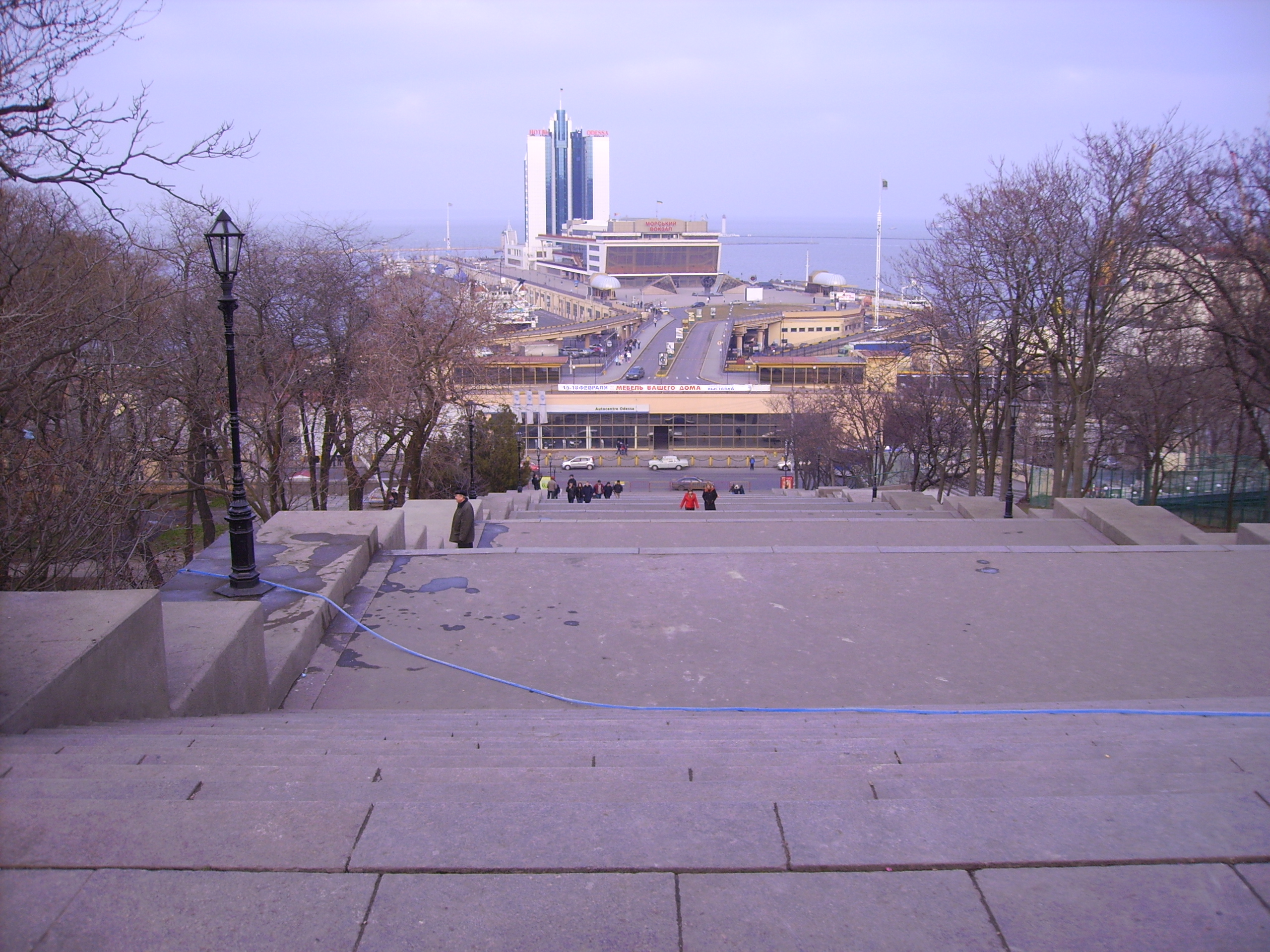 Blick von der Potemkinschen Treppe zum Hafen